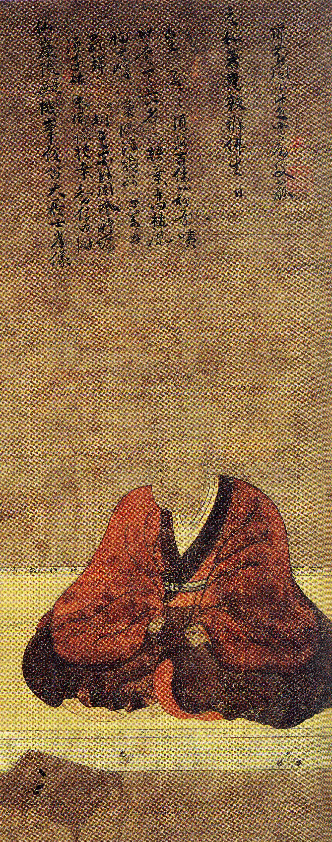 今川氏真(1538-1614)の肖像画。没後に供養・追慕の為に描描かれており、正妻・早川殿と対になっている。個人像。